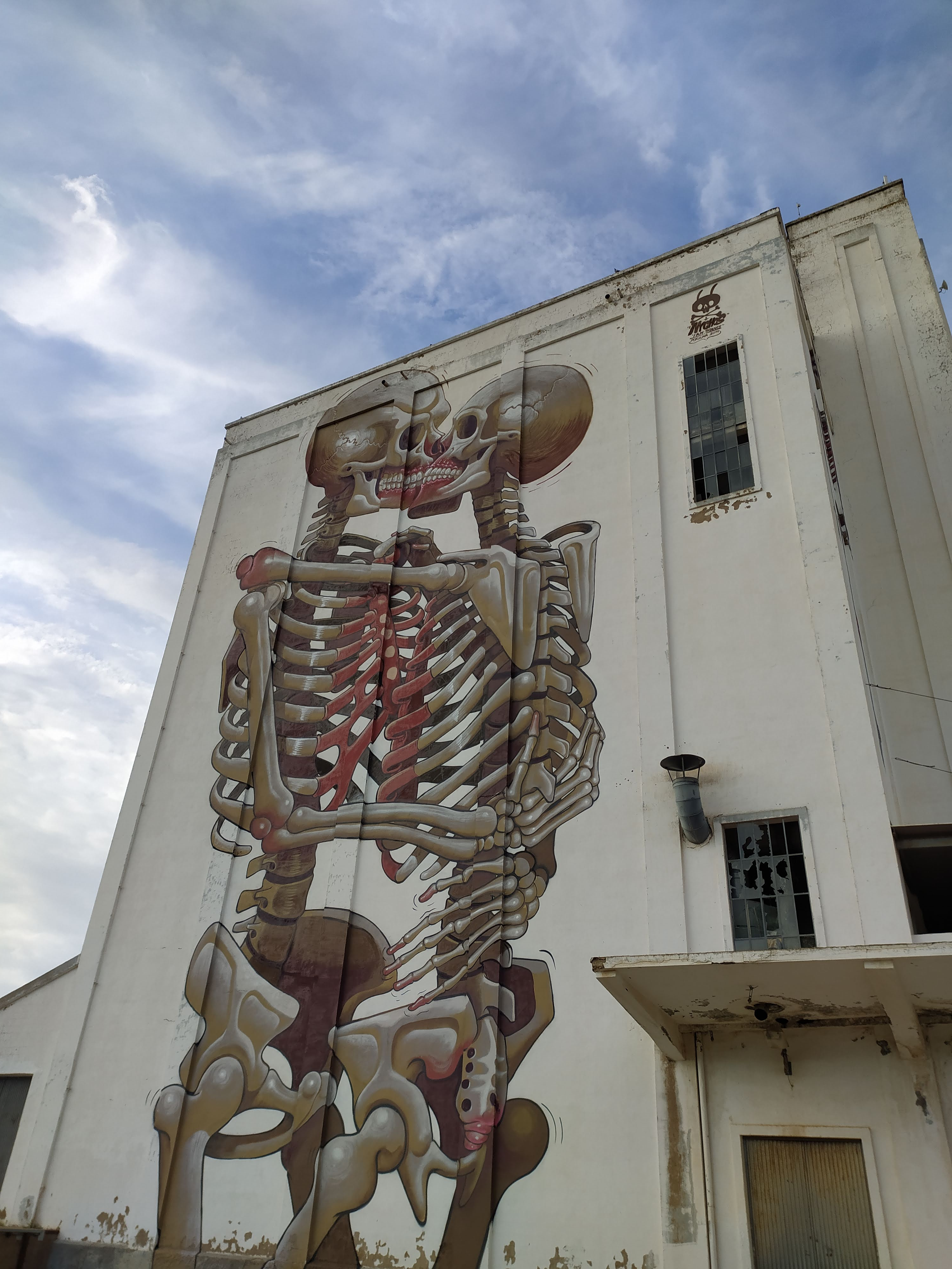 Mural de Nychos en el silo de Porzuna (Ciudad Real). Con The pillar of unified love, Nychos quiso que el esqueleto, humano y animal, fuera protagonista de la intervención. El miedo a la muerte es una característica muy humana, y el esqueleto es la clara representación de la misma. Sin embargo, el artista quiso aprovechar sus recientes investigaciones y experiencias personales sobre el cuerpo físico, la conciencia y la espiritualidad para descontextualizar nuestro concepto de la muerte. Para el artista austriaco, no ha lugar para el miedo a la muerte ya que el amor es todo e infinito.